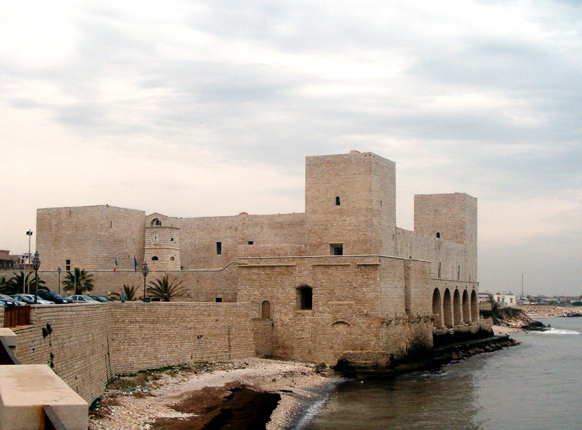 Castello di Trani (Puglia, Italy)